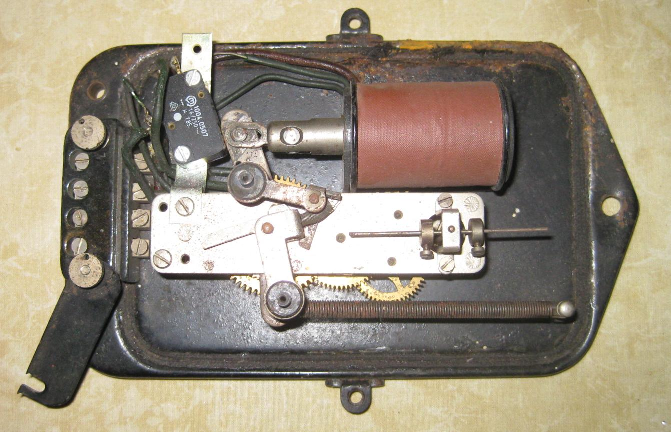 Alter Treppenlichtautomat mit Foliot. Der originale Kontaktsatz wurde durch einen Mikrotaster ersetzt. Der originale Kontaktsatz wurde durch einen Mikroschalter ersetzt. Die geringe Weglänge der Hysterese des Mikroschalters genügt, um dem Anker den zum Spannen der Feder notwendigen Schwung zu verleihen.